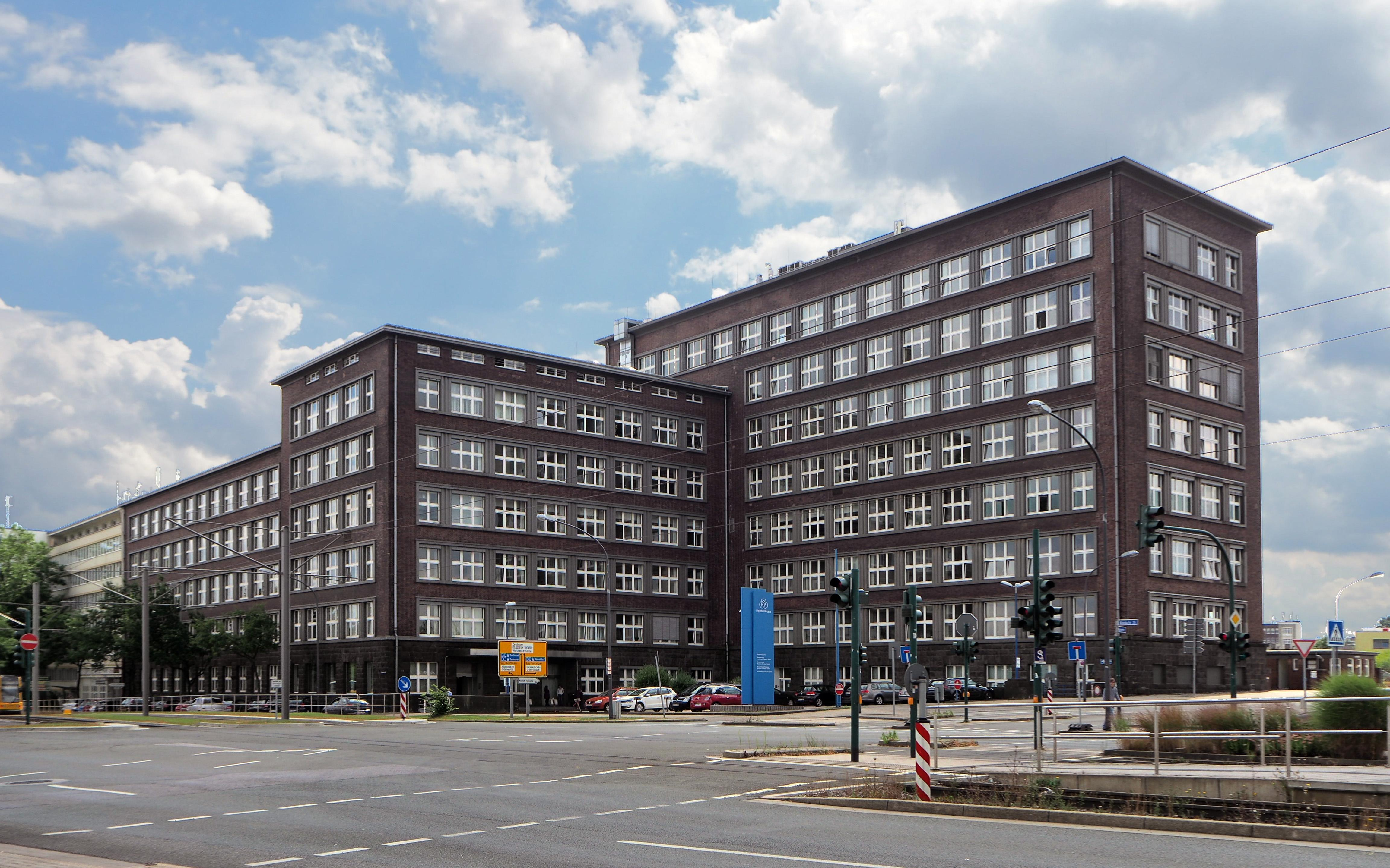 Essen, ehemalige Krupp-Hauptverwaltung an der Altendorfer Straße